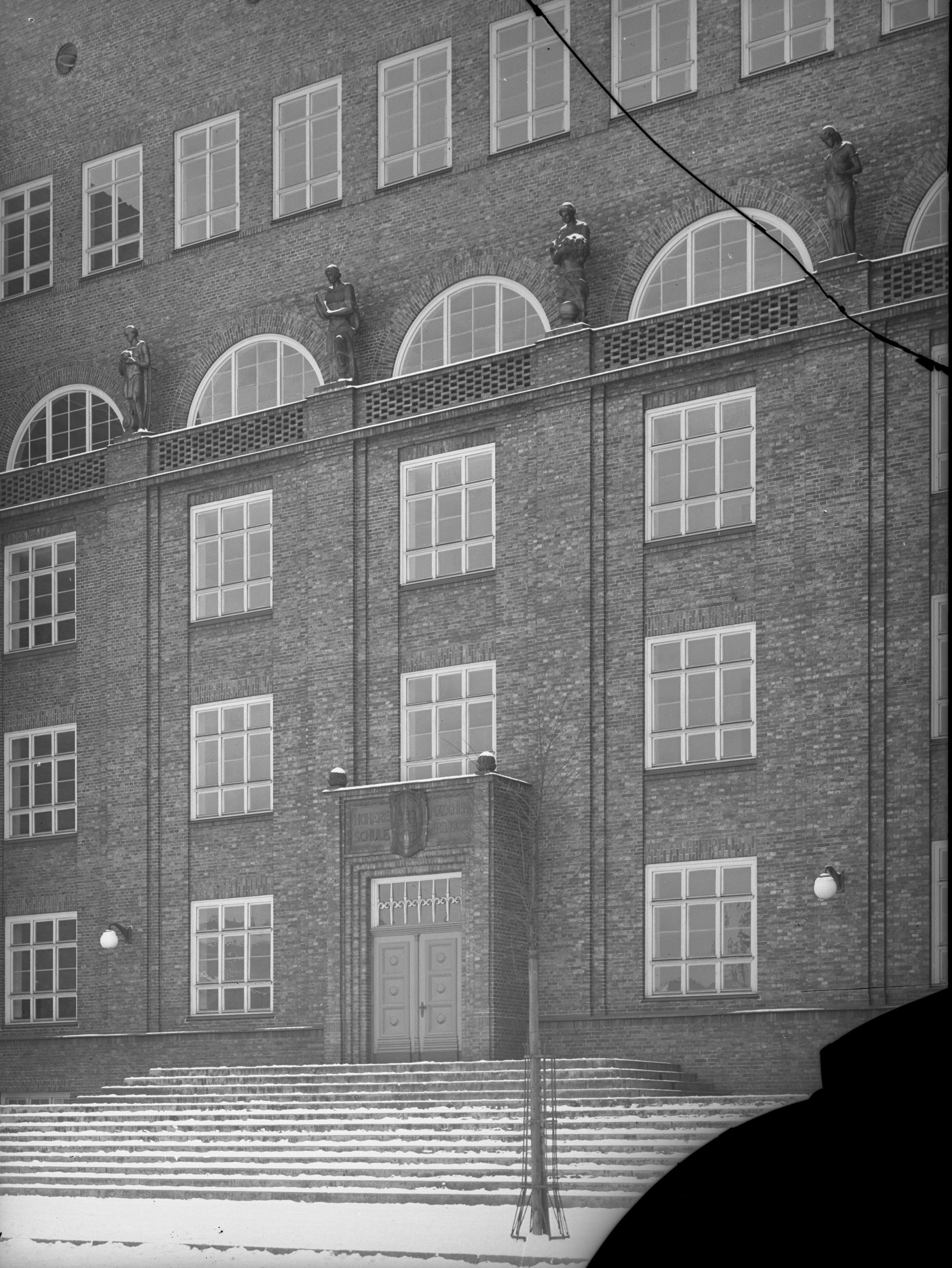 Haupteingang Klosterschule, ehemals Lyzeum am Lübeckertorfeld.